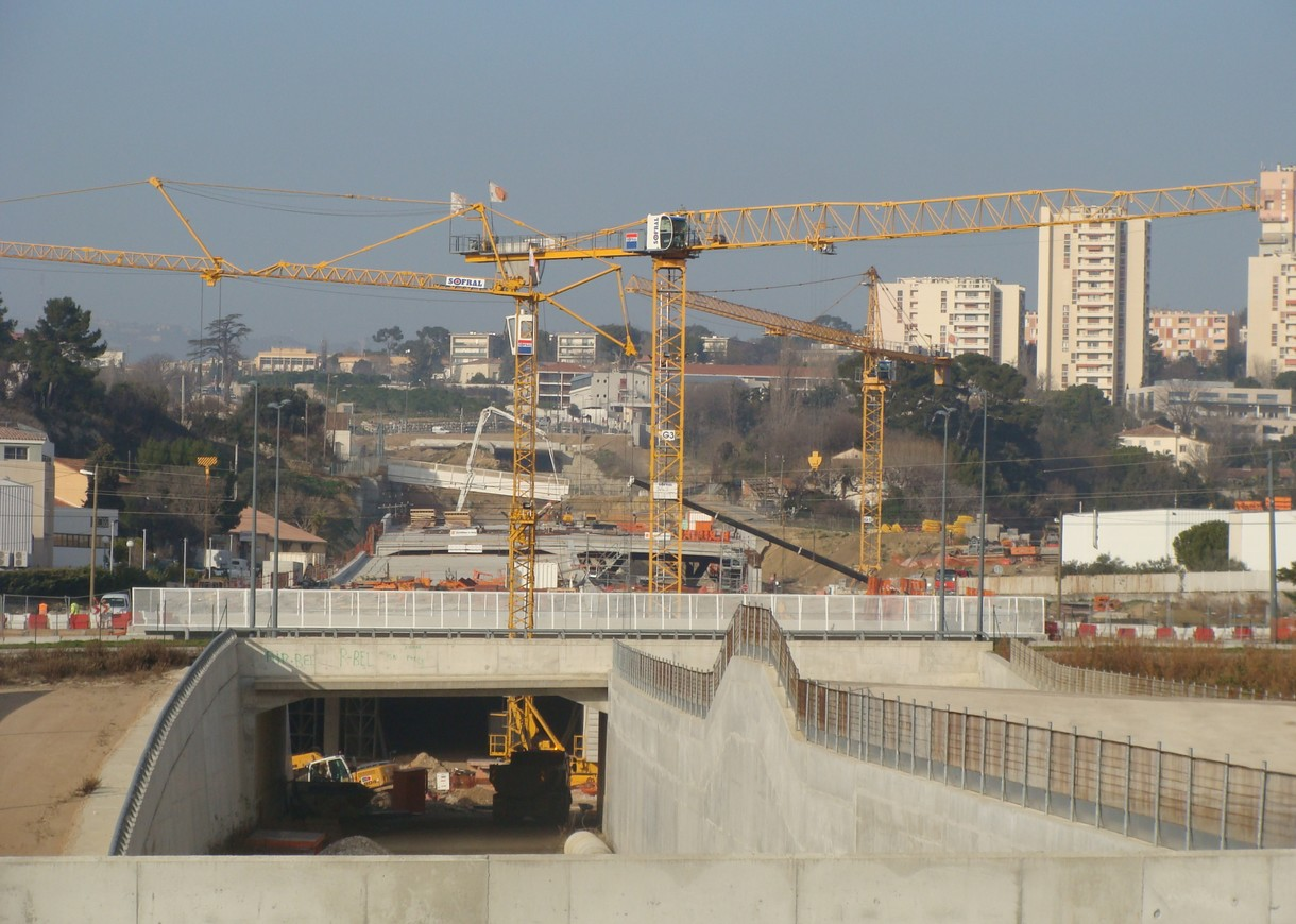 Le chantier de l'autoroute A507 à la Parette (Marseille, 12e arr.).